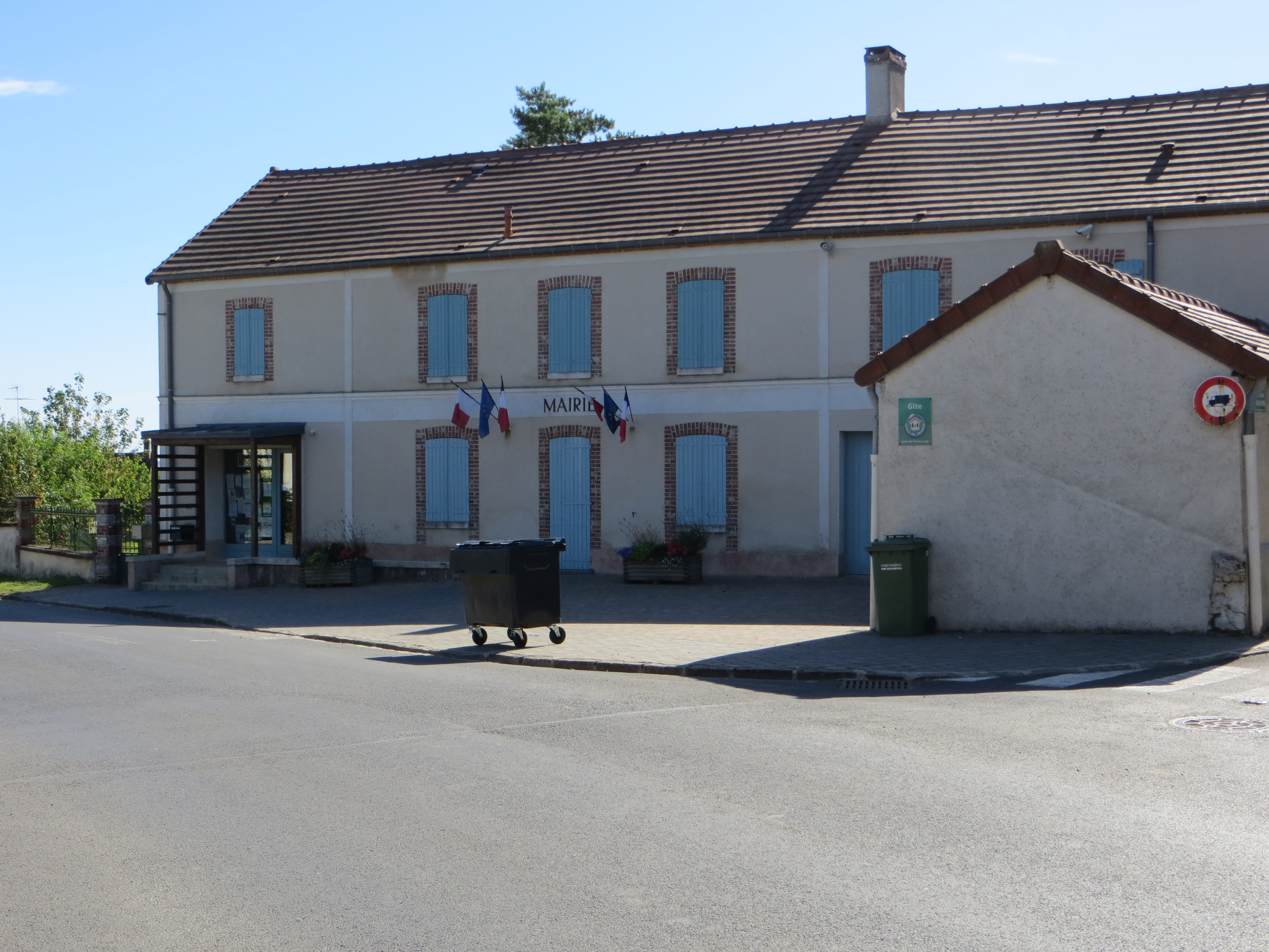 Mairie